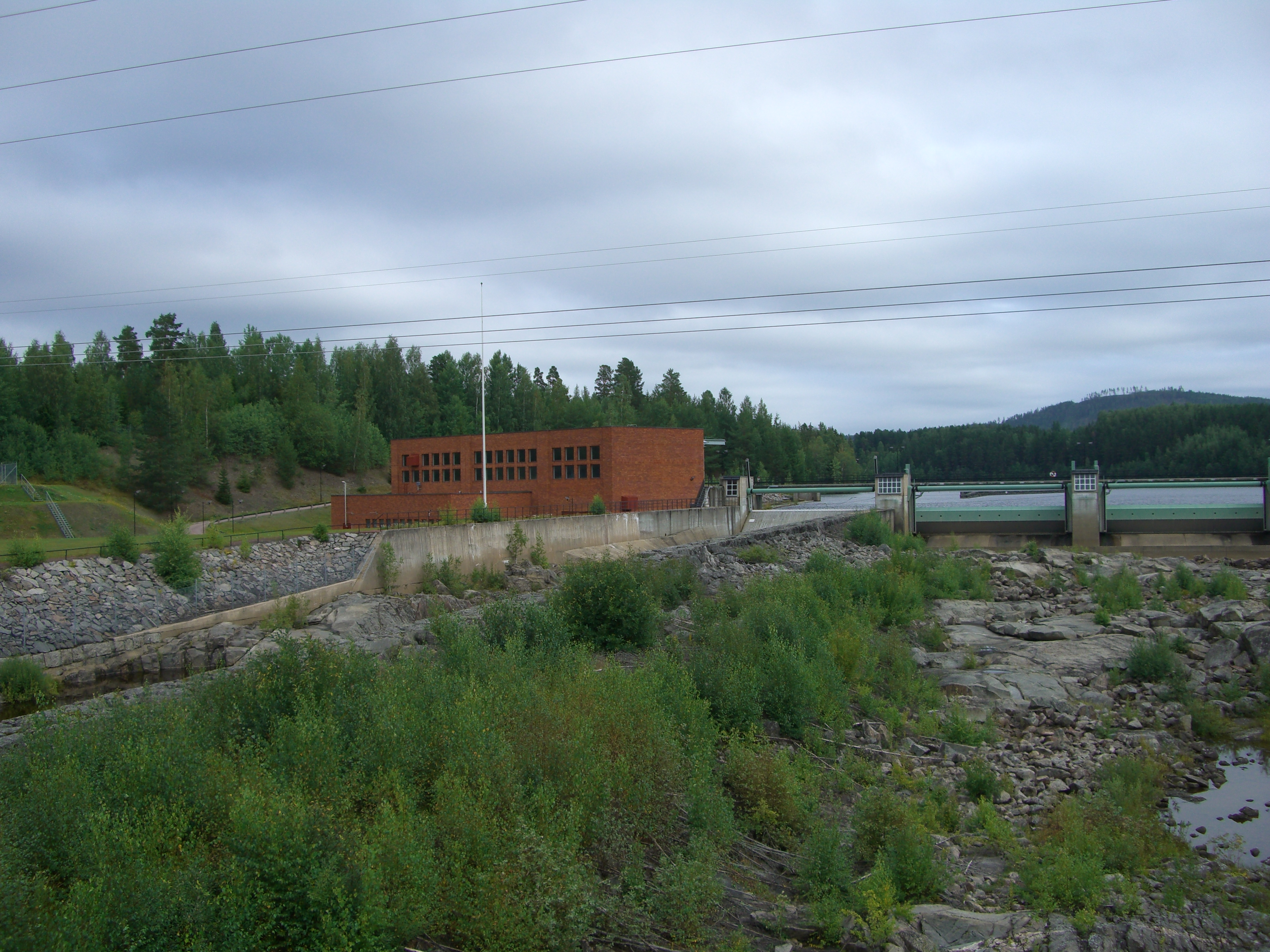 Swedish hydroelectric dam